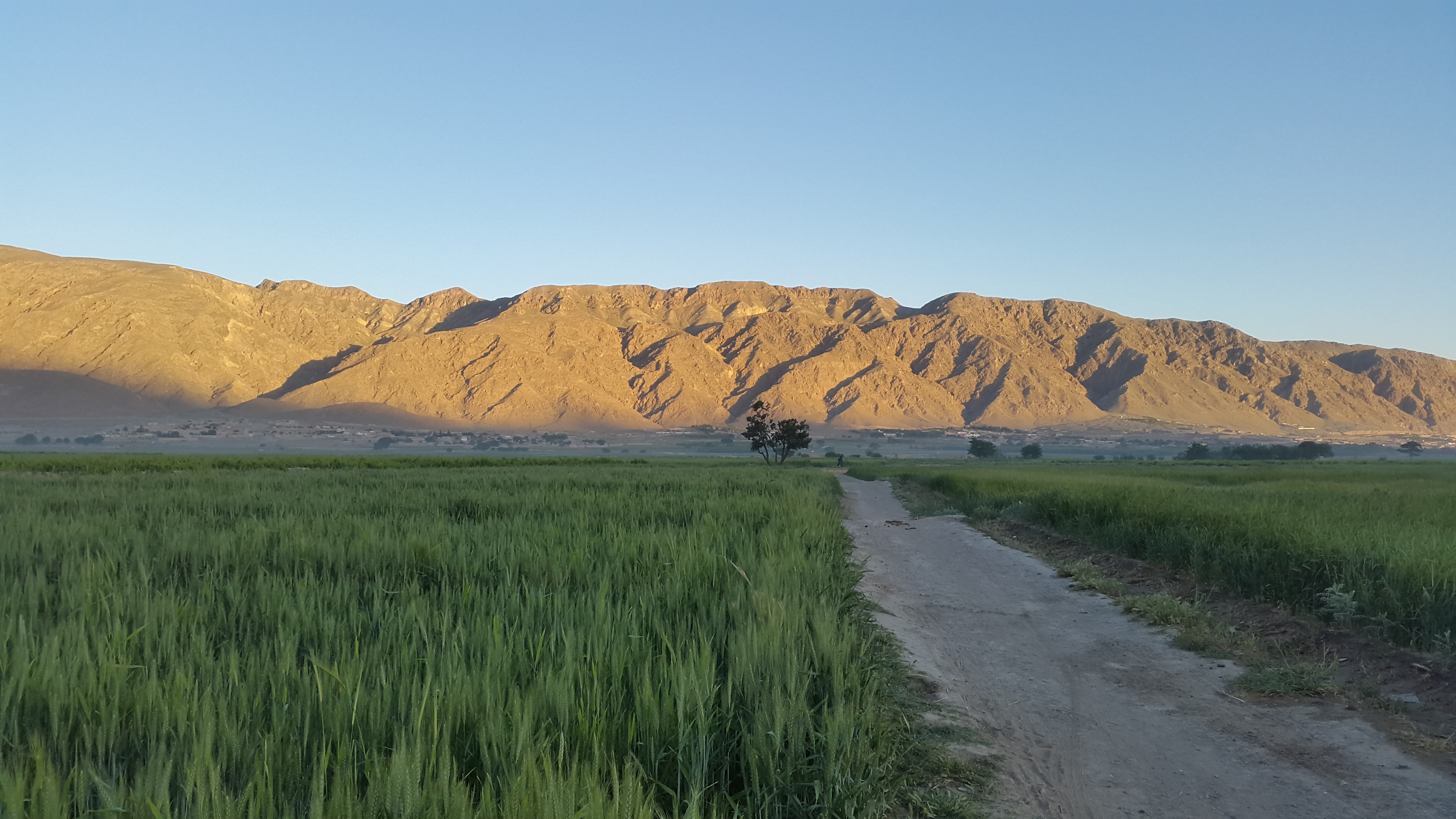 Kachi baig